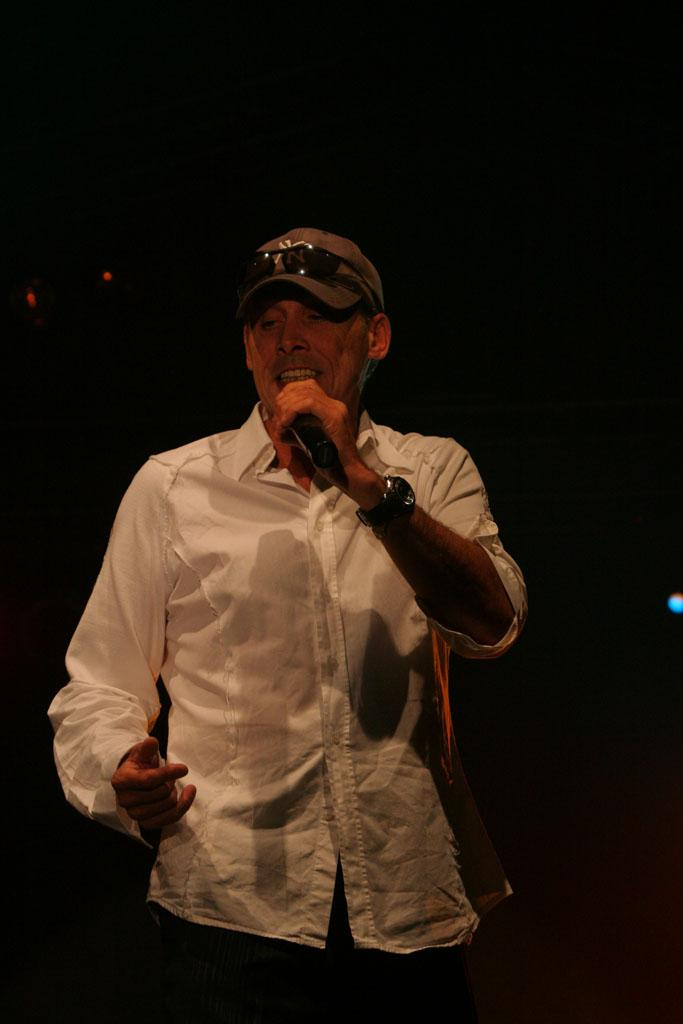 John McInerney wokalista grupy Bad Boys Blue podczas Święta Róży w Kutnie (08.09.2007)